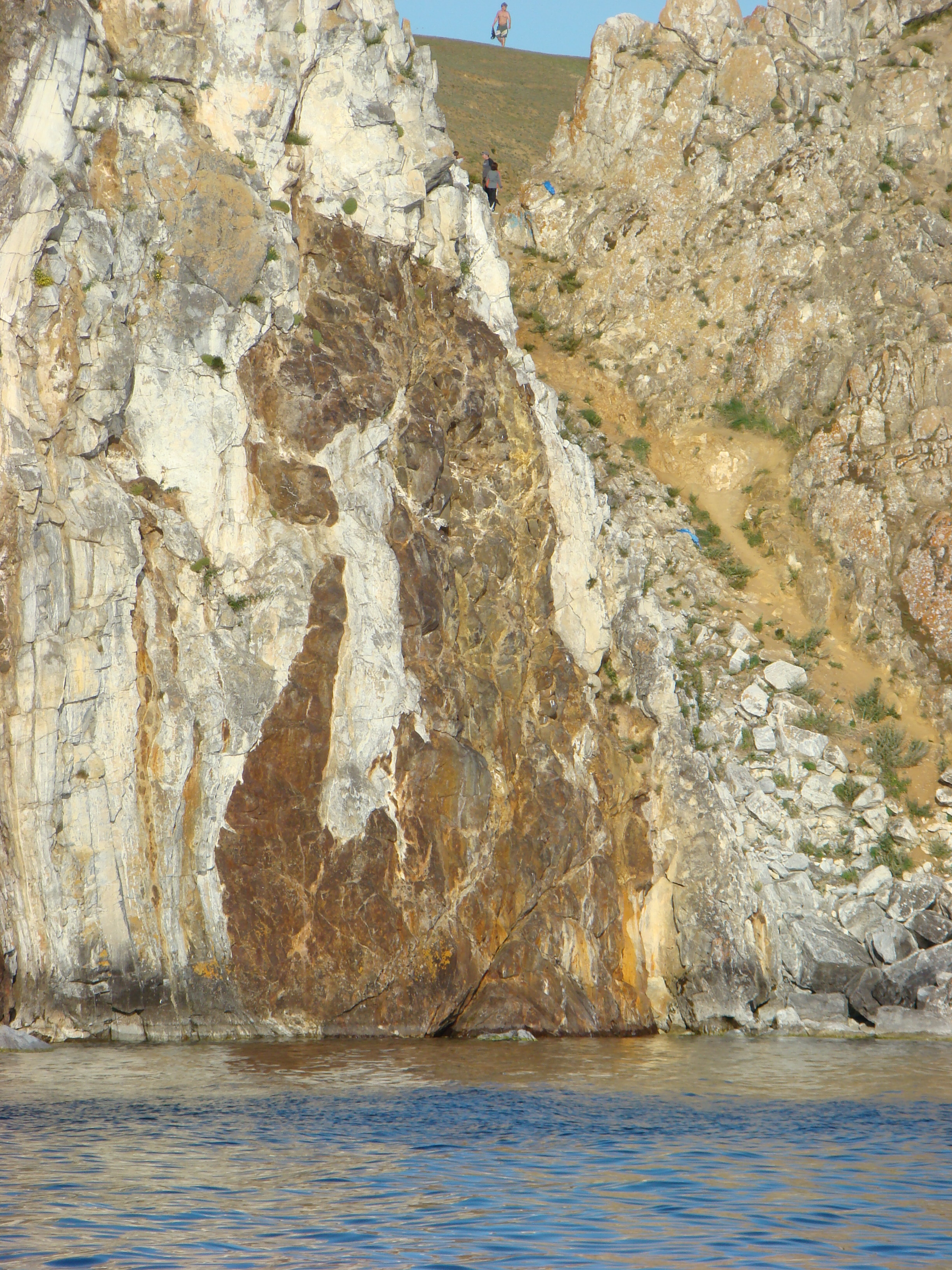 Изображение дракона на Шаман-скале. Остров Ольхон. shaman rock dragon